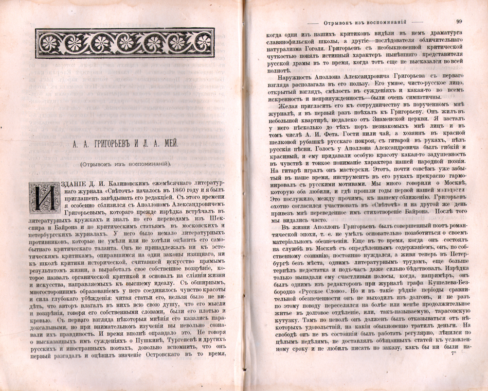 «А. А. Григорьев и Л. А. Мей». (Отрывок из воспоминаний)